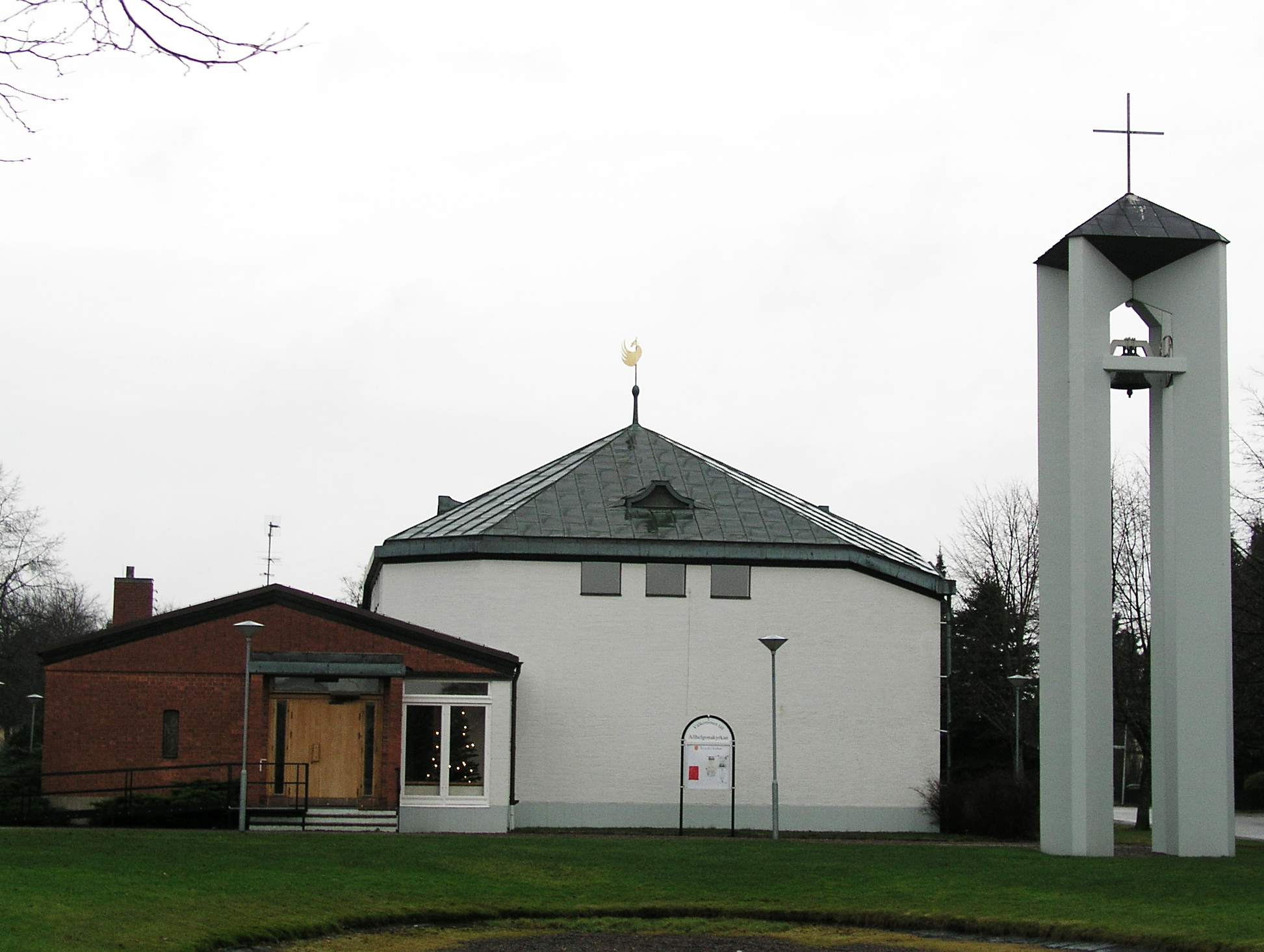 Allhelgonakyrkan, Ljungsbro, Diocese of Linköping, Linköpings kommun, Sweden.